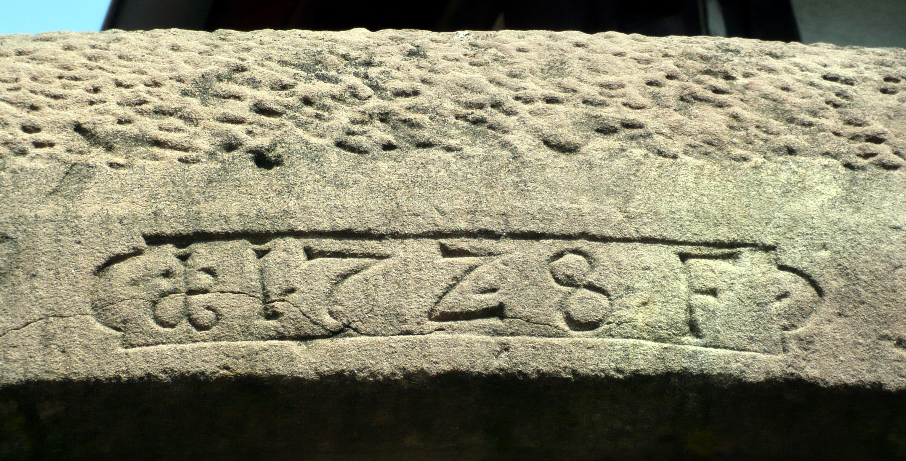 Torbogen aus Sandstein mit eingemeißelter Jahreszahl 1728; Portail de Grès 1728